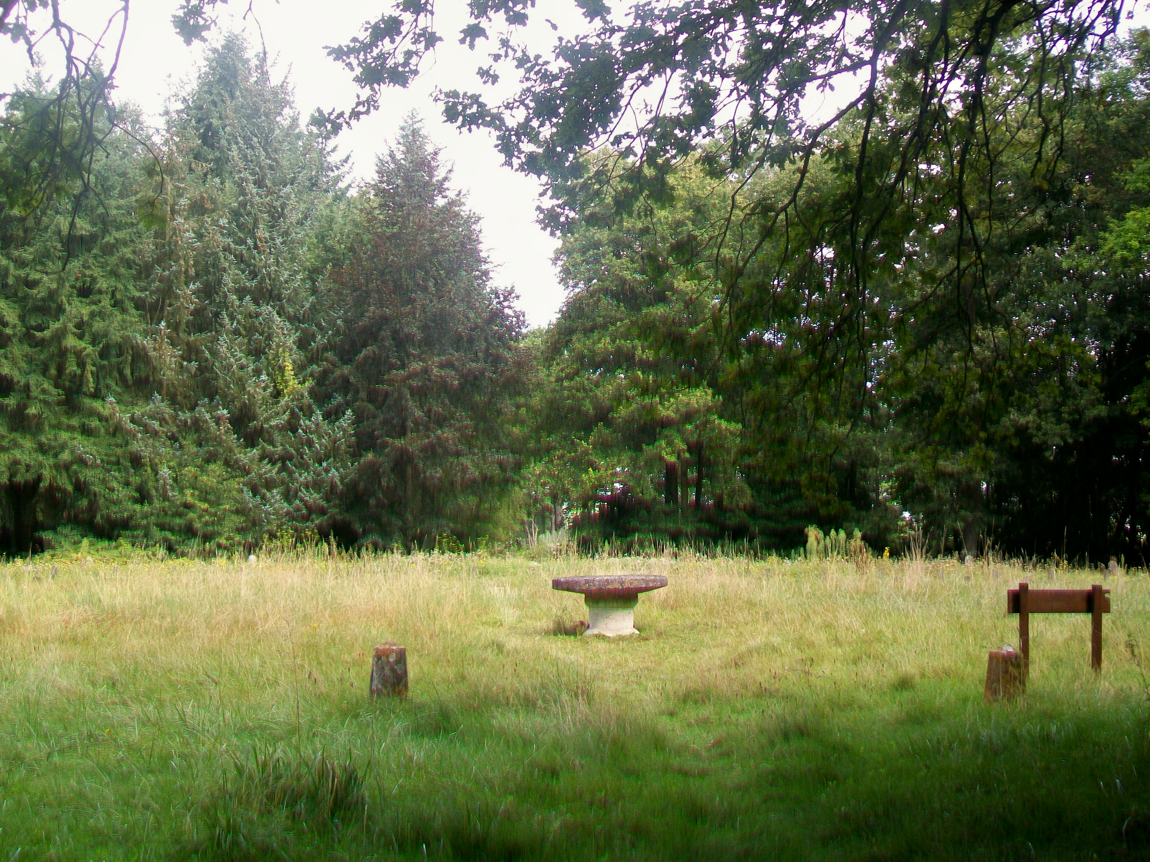 La table de Cassan, sur la RD 922 au nord-est de la ville.